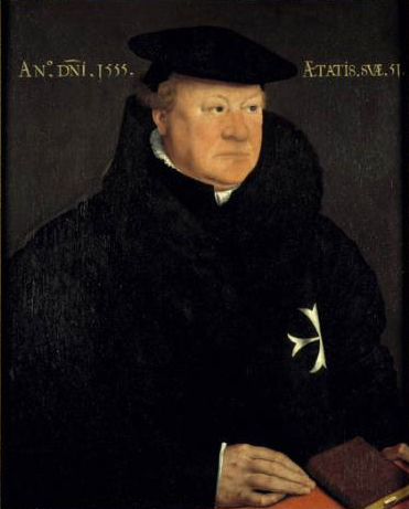 Portret van Wouter van Bylaer ook Wolter van Byler (1504-1560), landscommandeur van de Nederlandse Johannieters